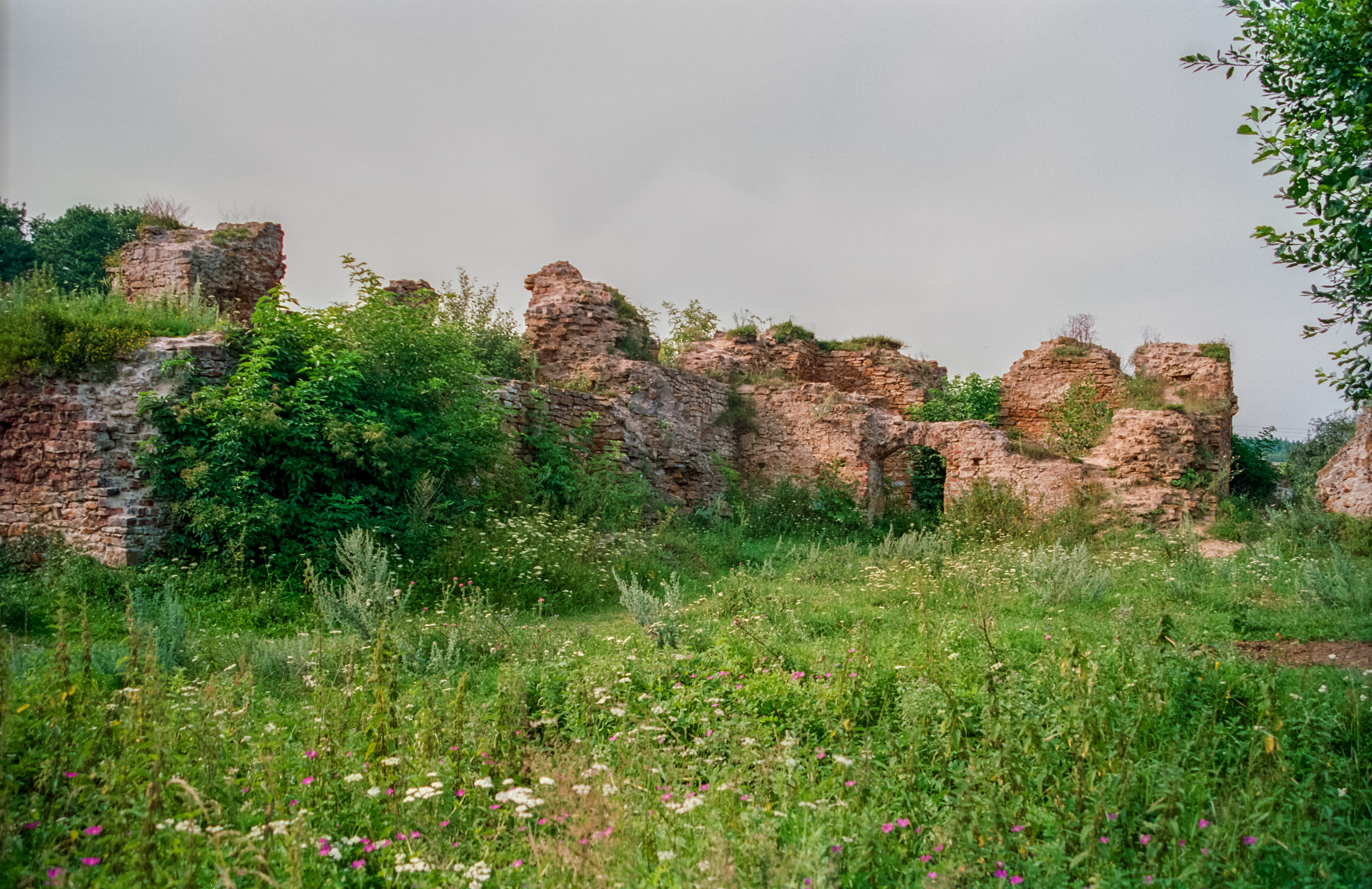 Inowłódz